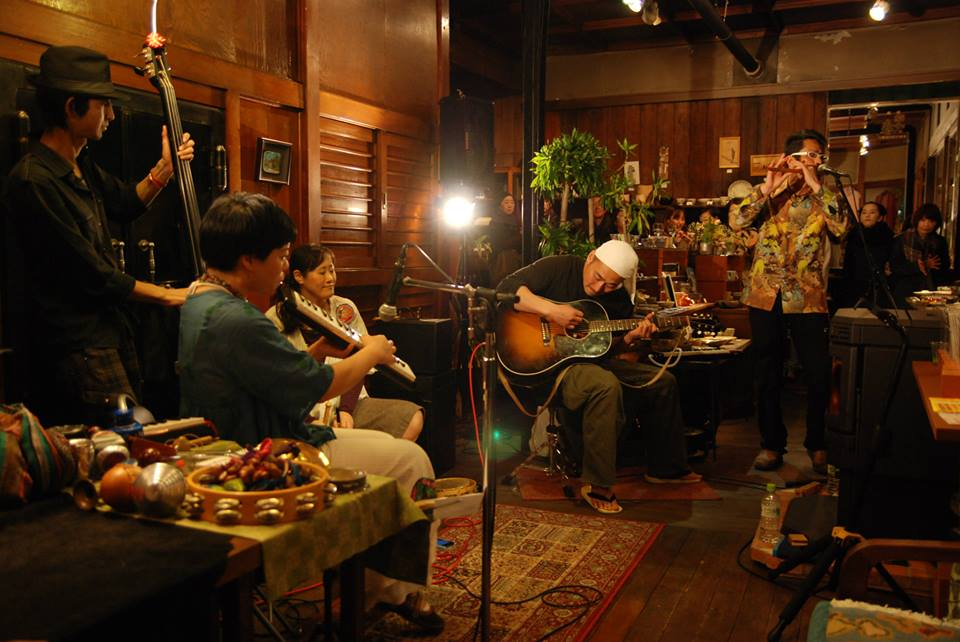 「函館西部地区 2014春のバル街」におけるひのき屋の演奏風景。はこだて工芸舎にて撮影。